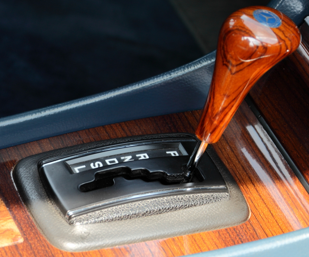 Wählhebel eines Mercedes-Benz 450 SE (Werkscode W 116)